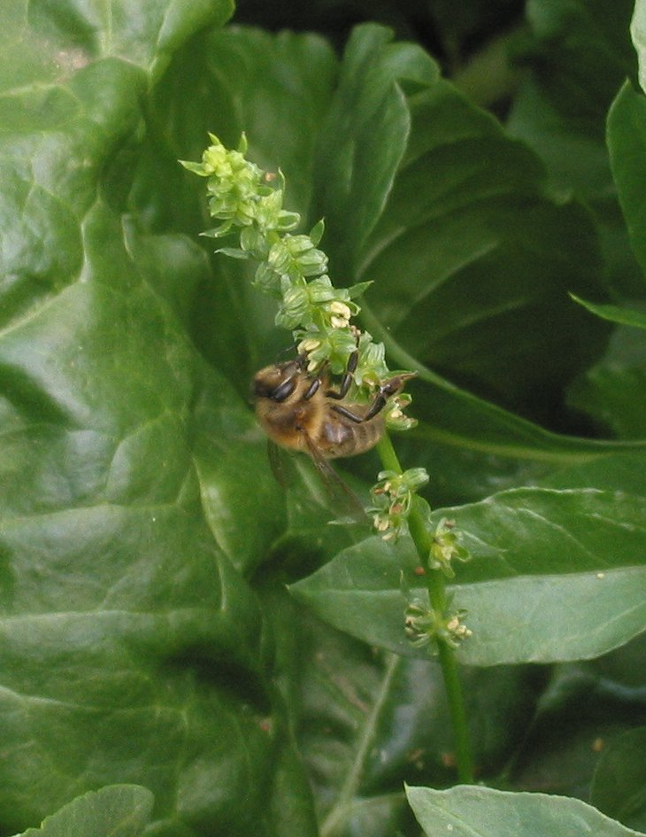 (nl: Suikerbiet bloemen met bij) Beta vulgaris flowers with bee